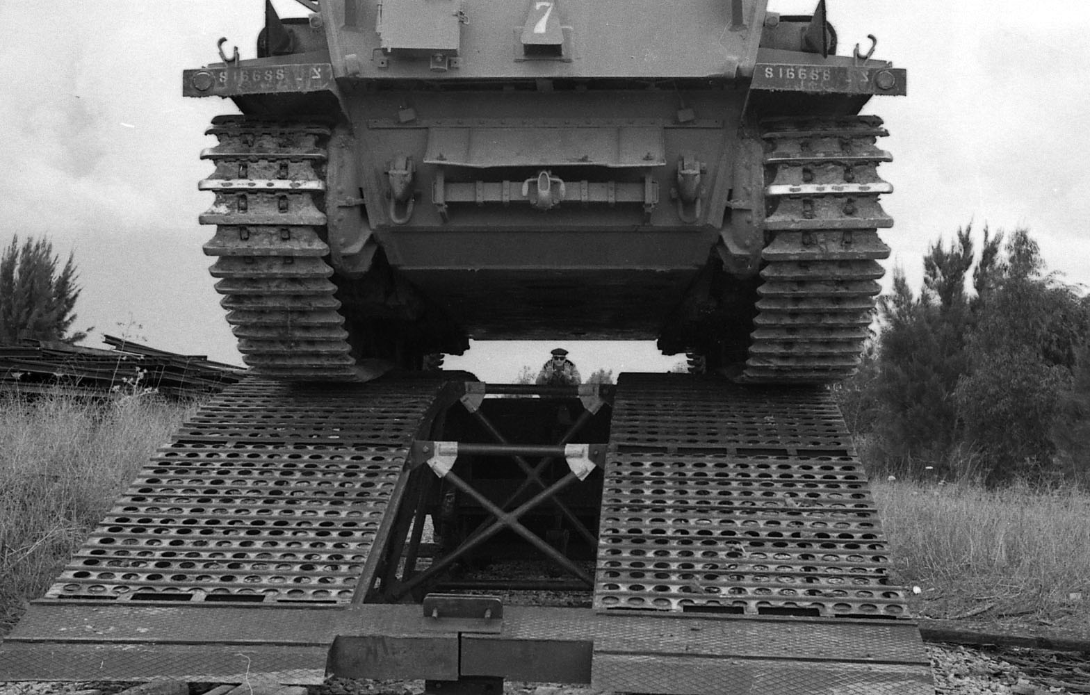 כבש פריק. התמונה במהלך ניסוי והדגמה של פתרון לבעיה מבצעית.